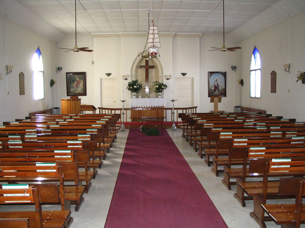 Den danske kirke i Tres Arroyos, Argentina